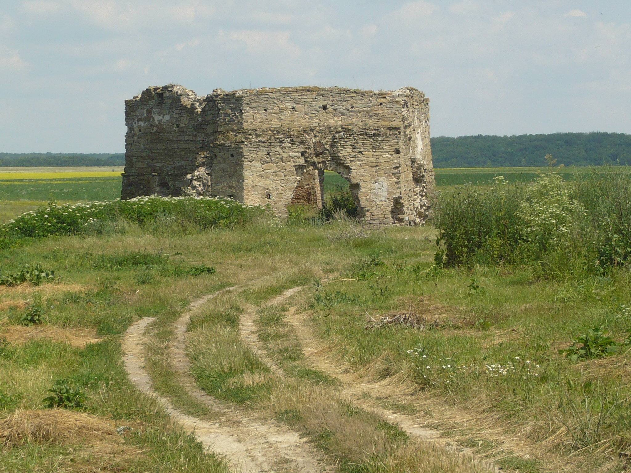 Zamek w Żwańcu